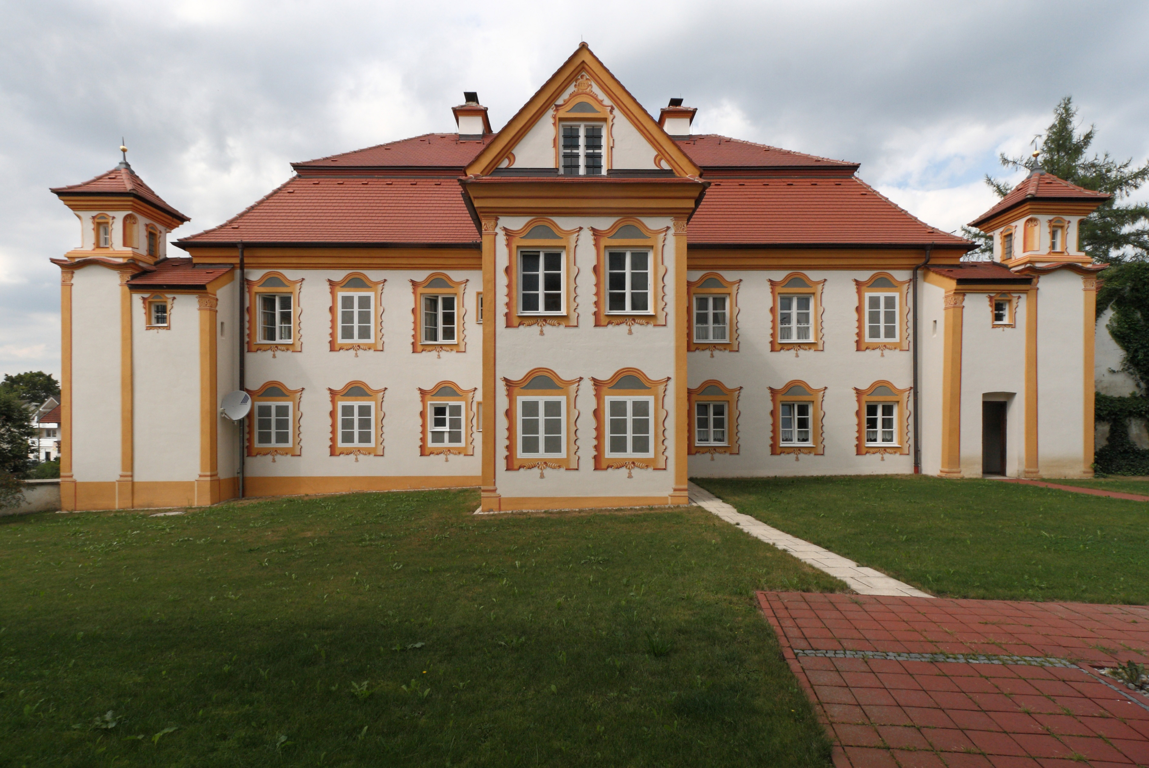 Südfront des Gebäudes mit dem Risalit für das Treppenhaus in der Mitte und den flankierenden, über Zwischenbauten angefügten Aborttürmen